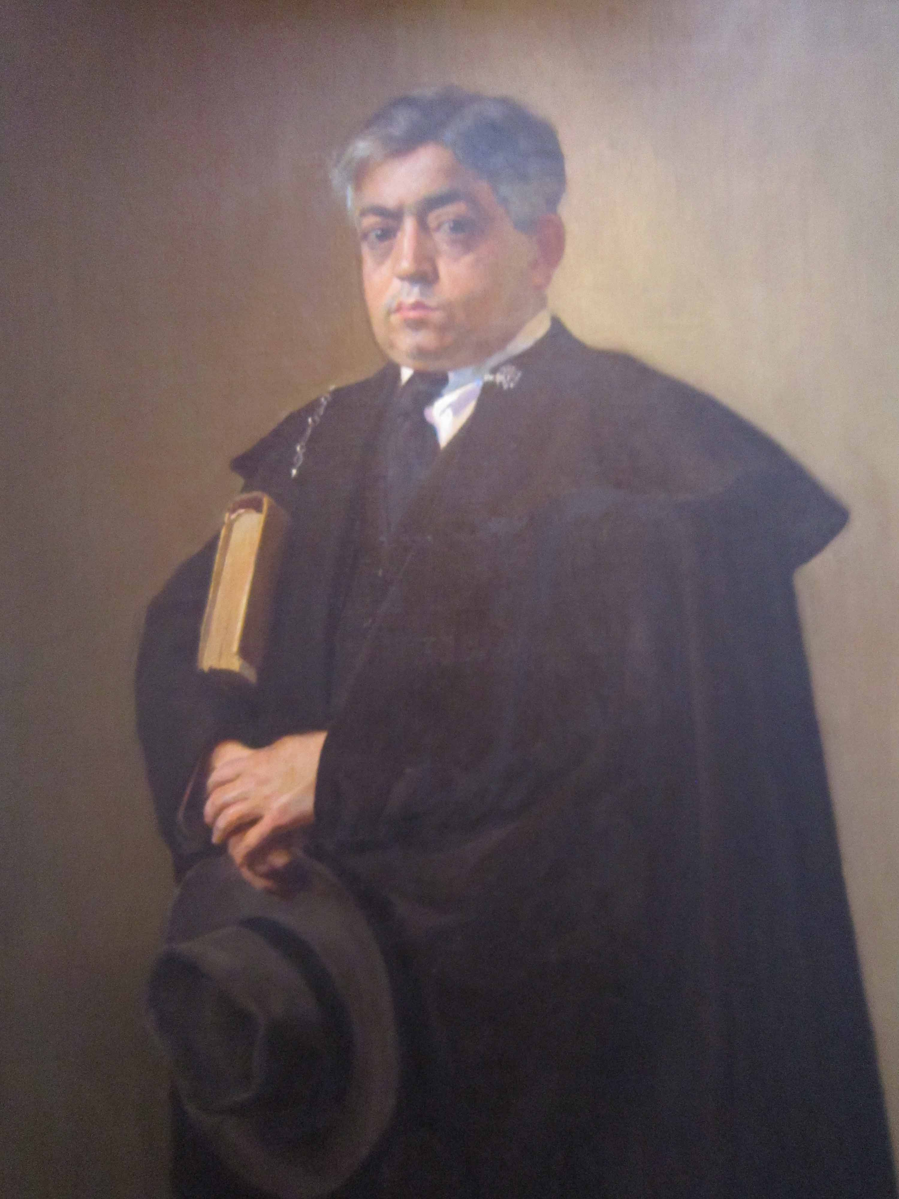 Retrato al óleo de Diego San José, obra de Ángel de la Fuente, en 1922.